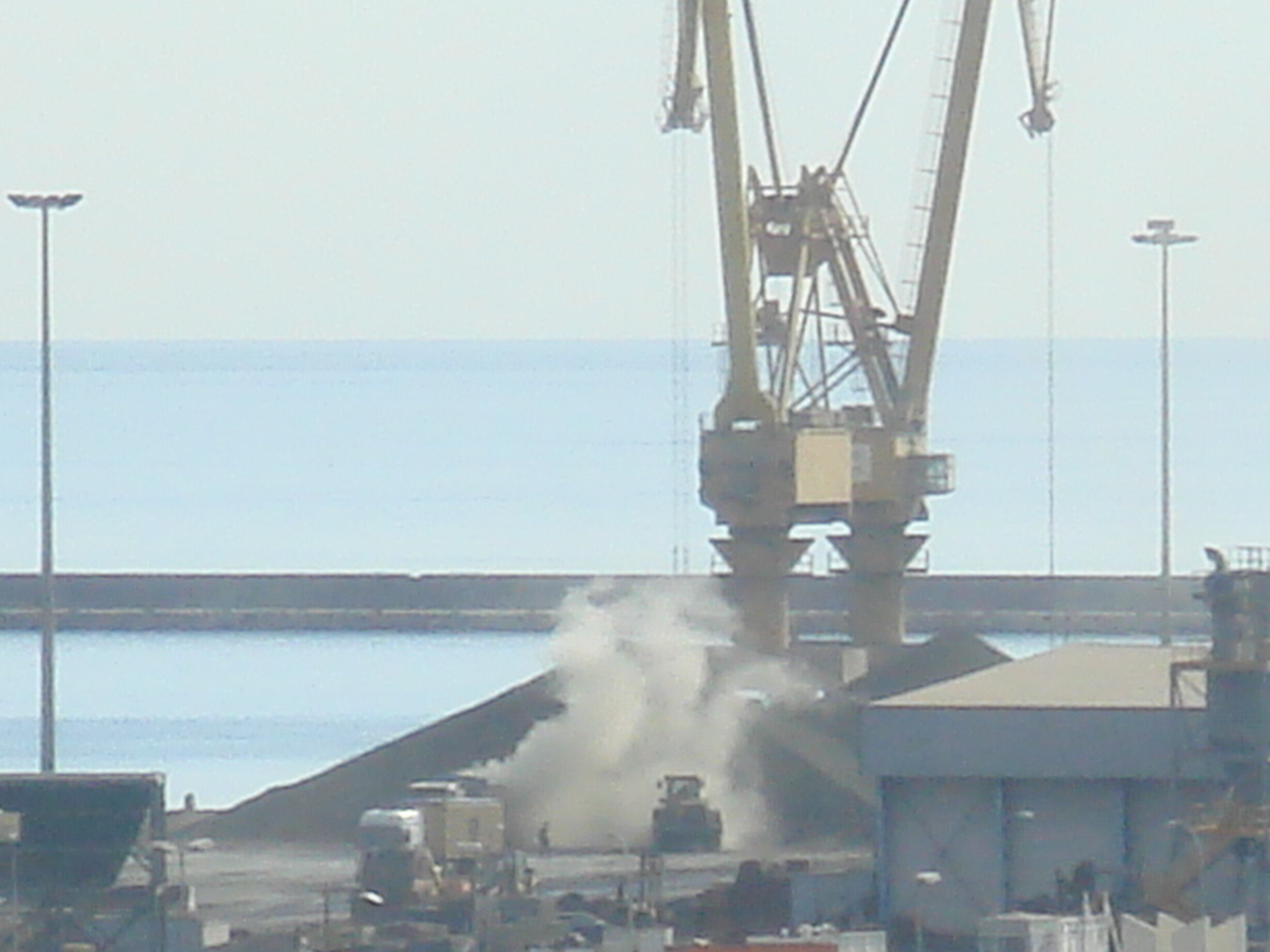 ClinkernubespuertoAlicante